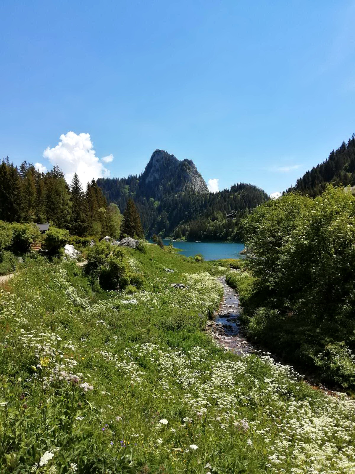 Vue sur le lac de Tanay depuis le ruisseau qui coule